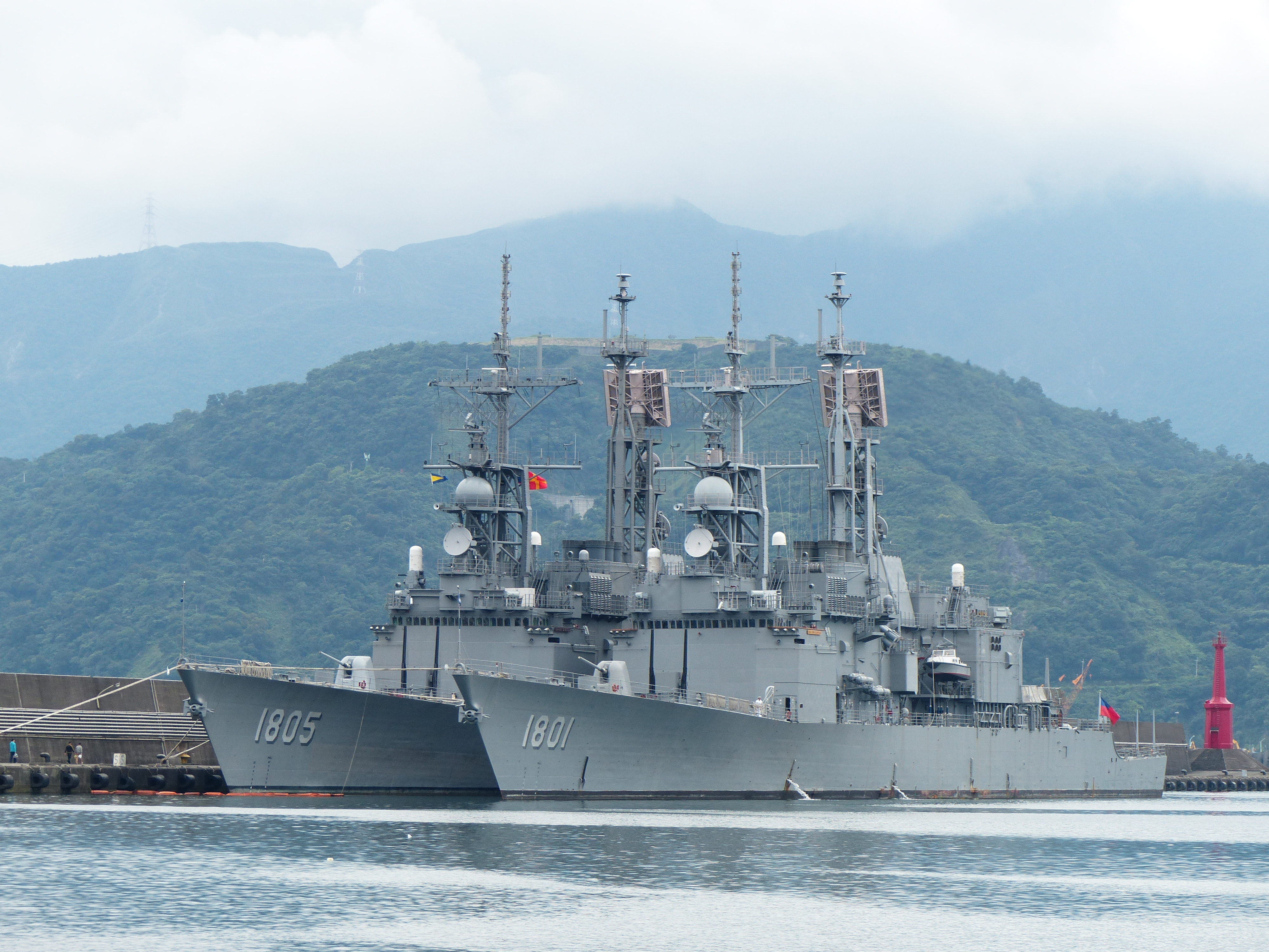 並泊中華民國海軍中正軍港碼頭的基隆級驅逐艦基隆（右）與馬公（左）。